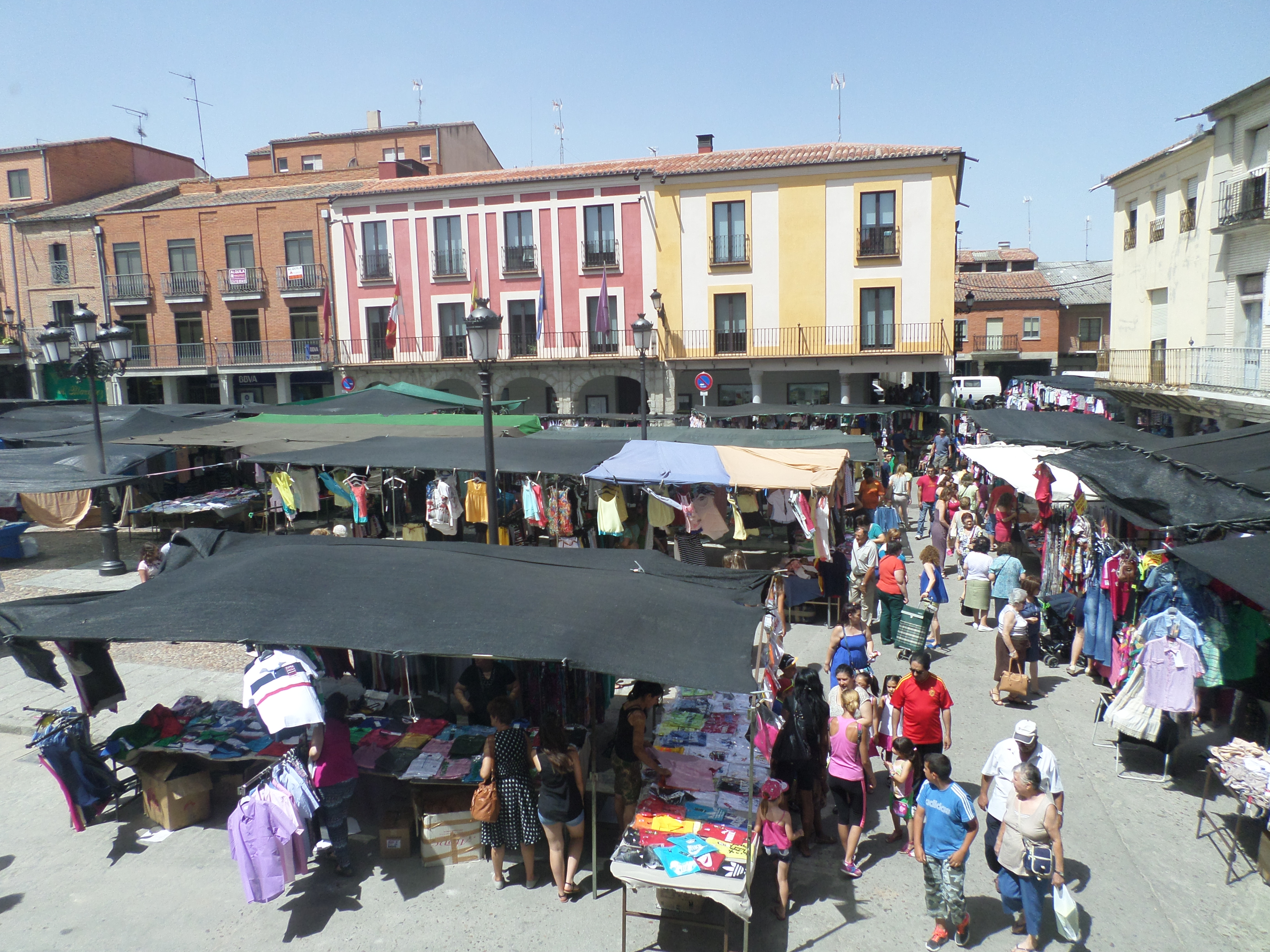 Celebración en la Plaza de la Constitución del típico Mercadillo semalan de cada jueves.